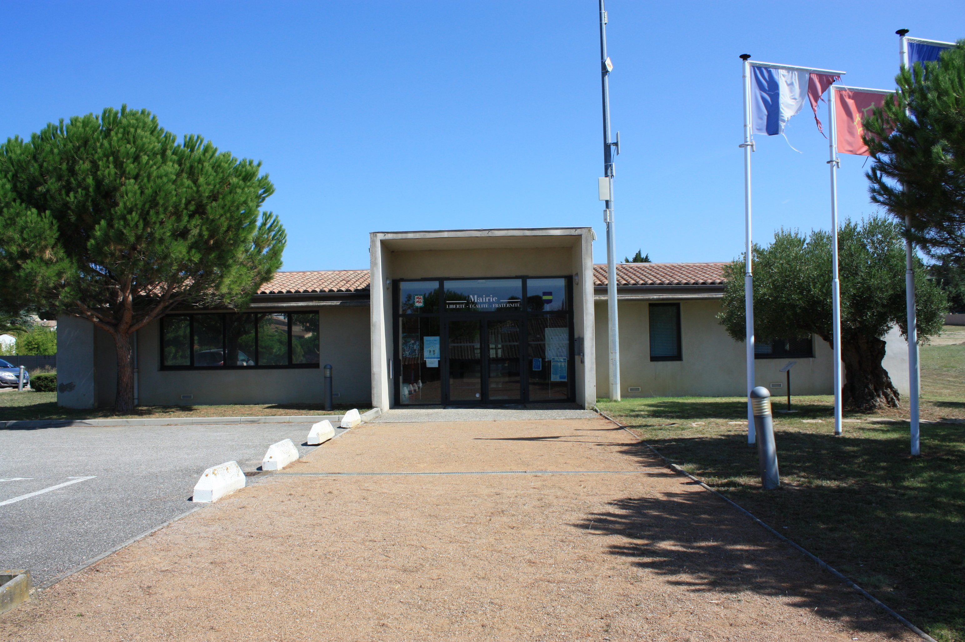 Mairie de Cazilhac